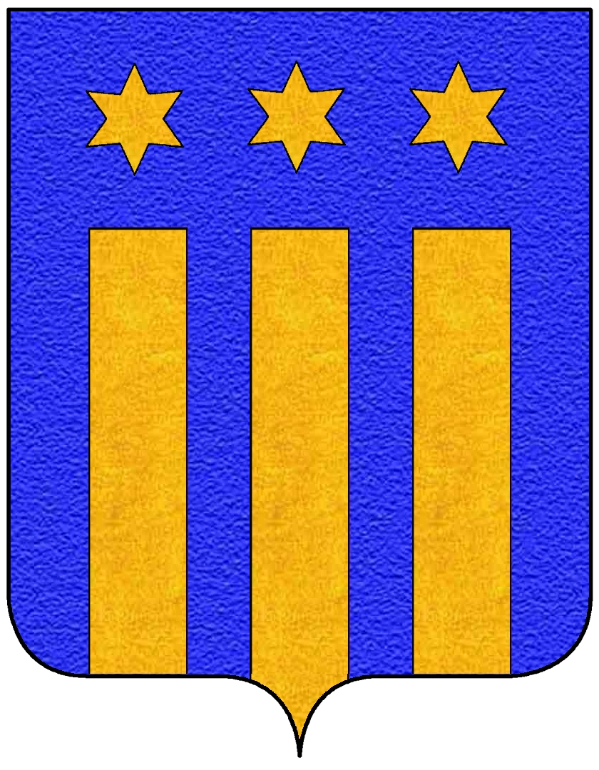 Stemma della famiglia Orsi di Forlì. Orsi (EMI LAZ MAR) (Forlì, Osimo, Roma) Titolo: Patrizi di Forlì (IT) d'azzurro, a tre pali scorciati, sormontati ognuno da una stella (6) il tutto d'oro. (citato in GUCA – pag. 404 e in DALE) (IT) 3 pali di oro scorciati accompagnati da - 3 stelle (6 raggi) dello stesso poste in fascia in alto tutto su azzurro (citato in LEOM) alias (arma antica): (IT) d'azzuro a 3 bande d'oro, al capo d'azzurro a 3 stelle d'oro (citato in DALE)